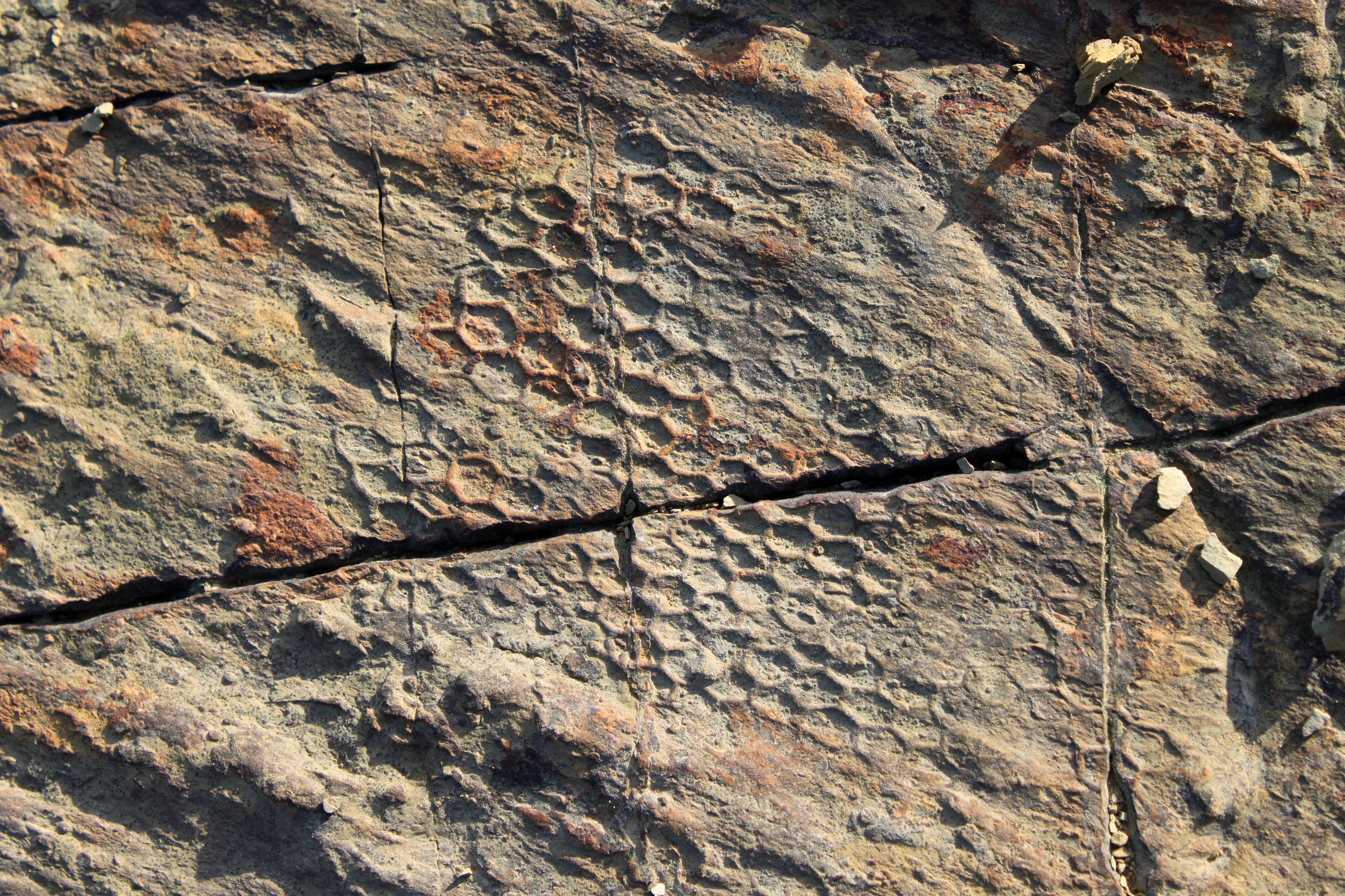 Paleodictyon, probablemente P. imperfectum en arenisca de los flyschs de la punta de San García. Complejos del Campo de Gibraltar, Unidad de Algeciras (Oligoceno-Mioceno). Algeciras, Andalucía, España.